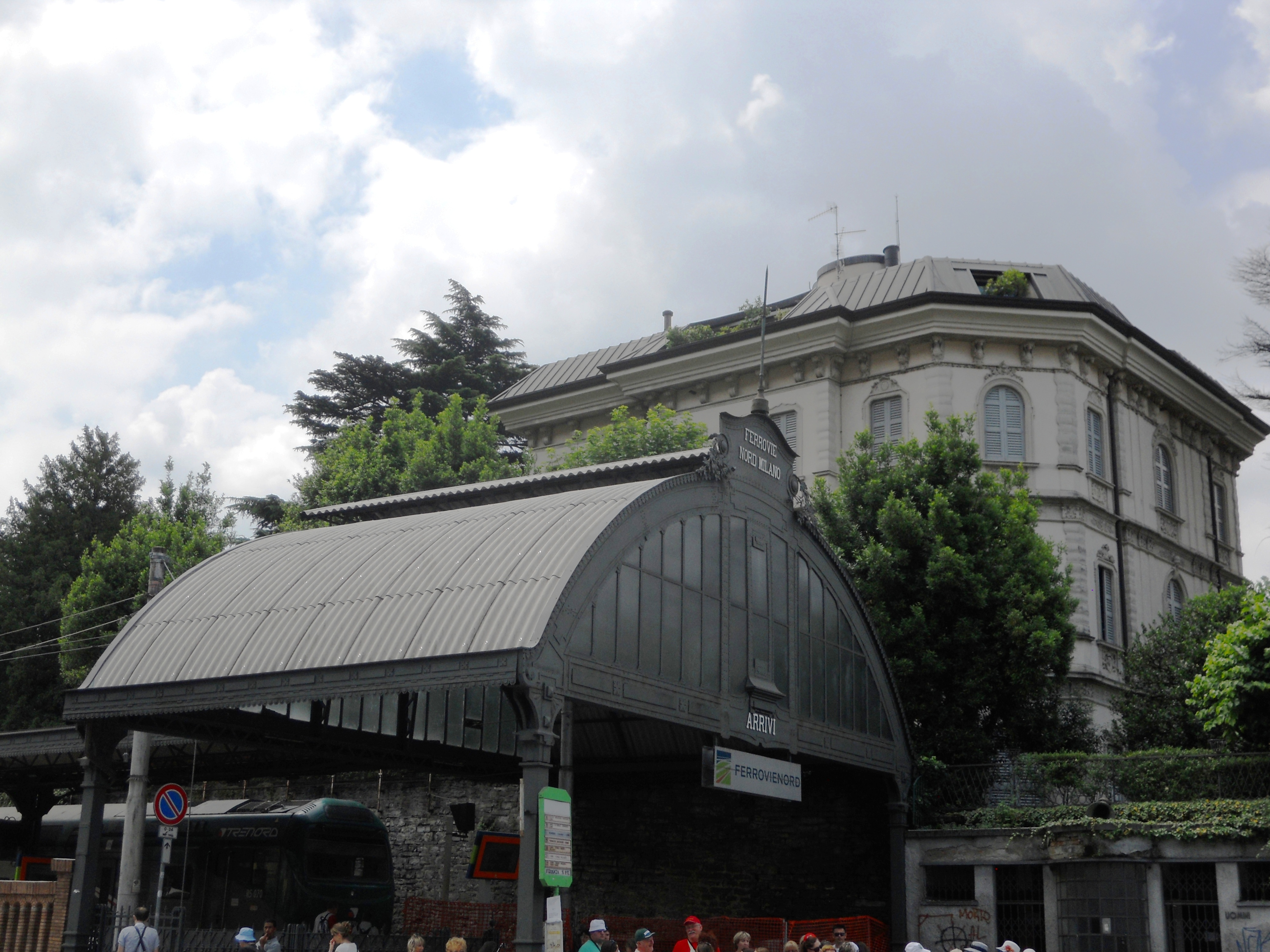 Pensilina di ferro Stazione Nord Lago